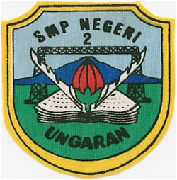 smp2ungaran